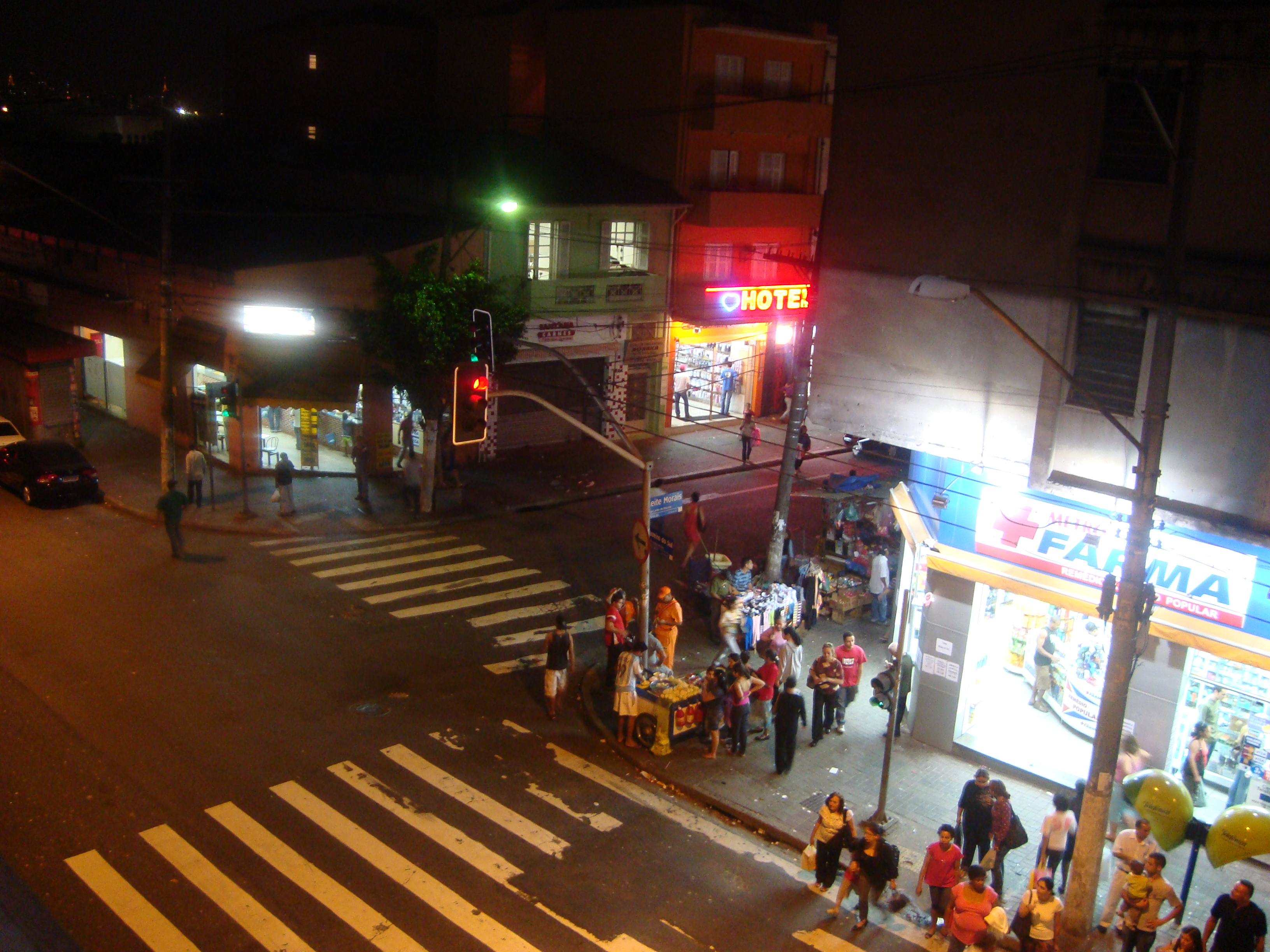 Foto do cruzamento cruzeiro do sul X leite de morais em santana, noturno